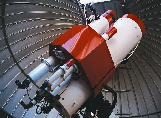 Telescopi de l'Agrupació Astronòmica de Sabadell